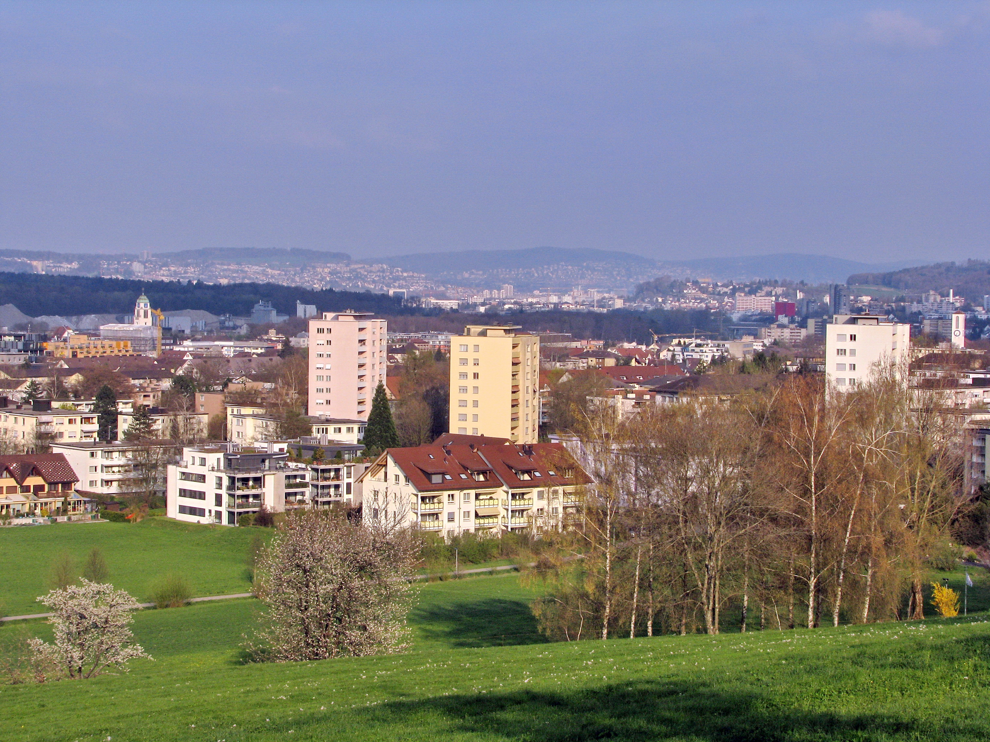 Dietikon (Switzerland), as seen from Grunschen, Limmattal in the background.